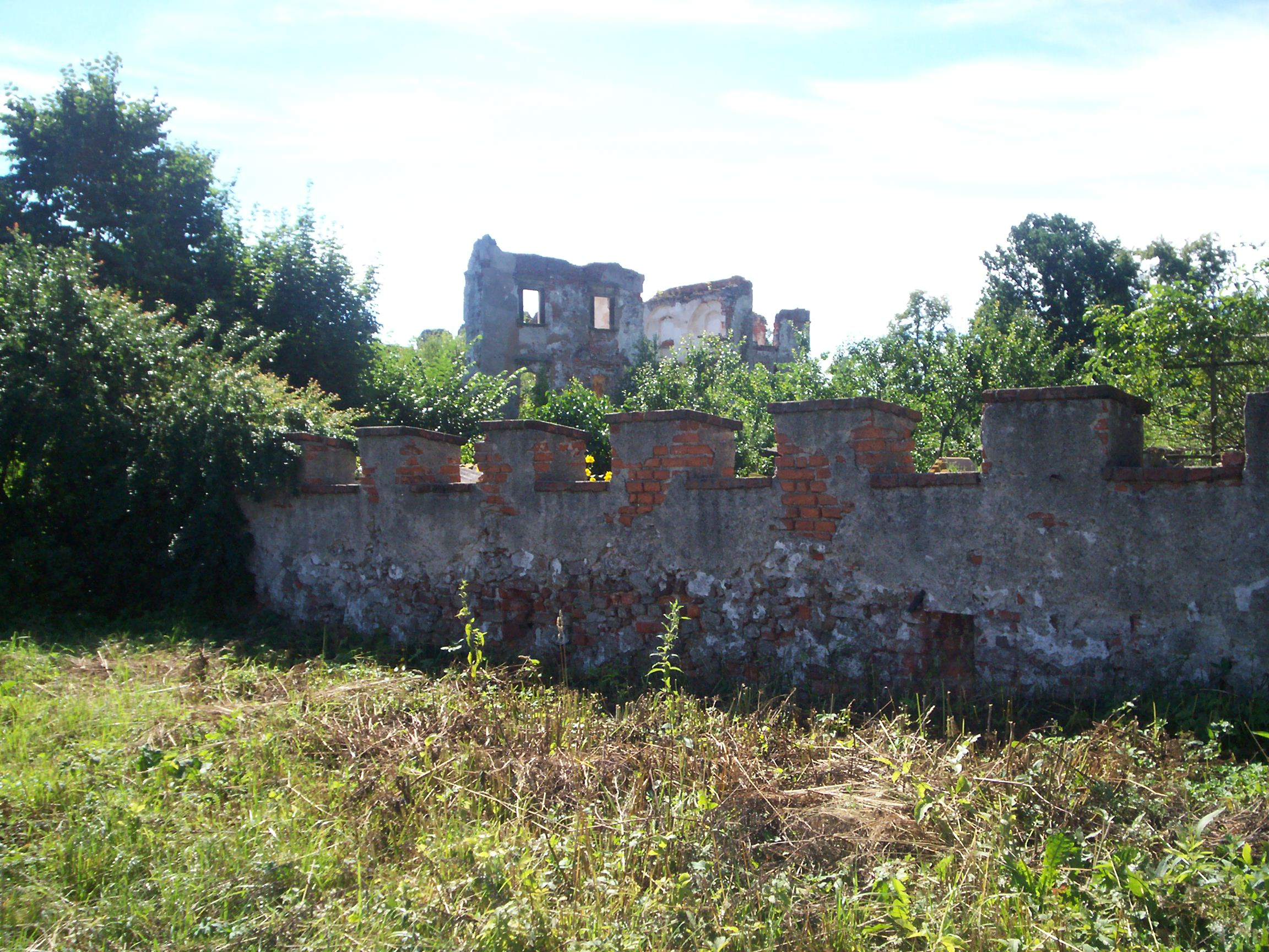 Kamienna Góra, grodztwo.